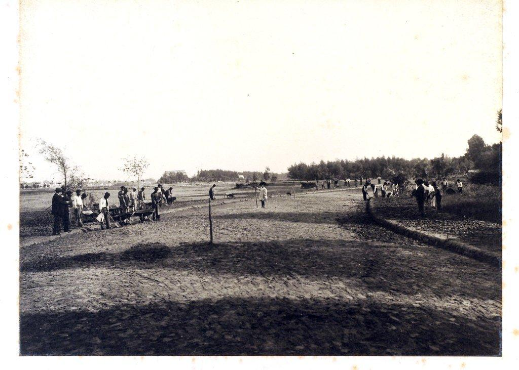 Carlos Thays (primero a la izquierda) y su familia observando la construcción o refacción del camino alrededor del Lago de Regatas, Parque 3 de Febrero, Buenos Aires, Argentina.